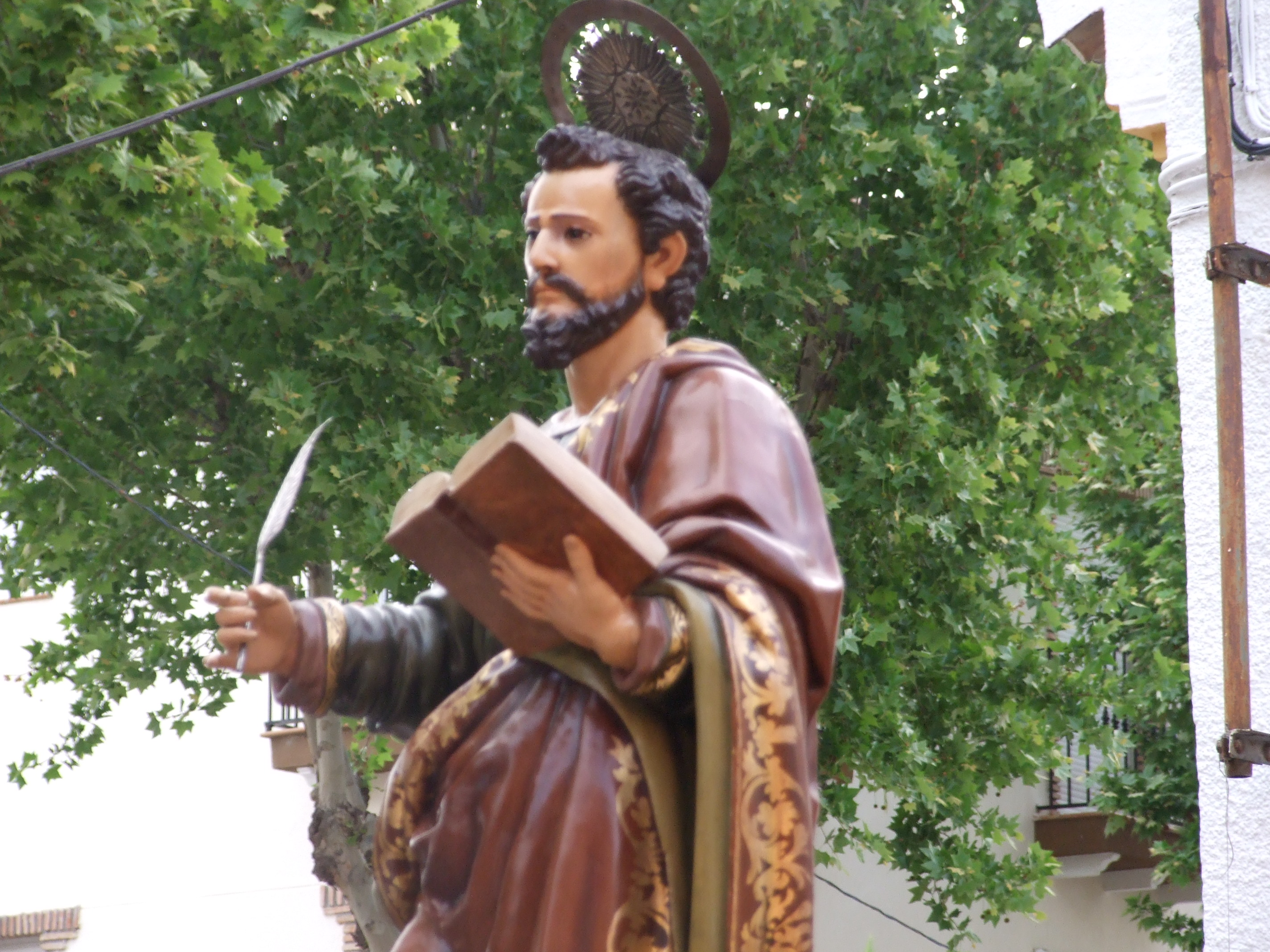 Imagen de San Marcos, patrón de la localidad de Belicena, en el municipio de Vegas del Genil (provincia de Granada, España)